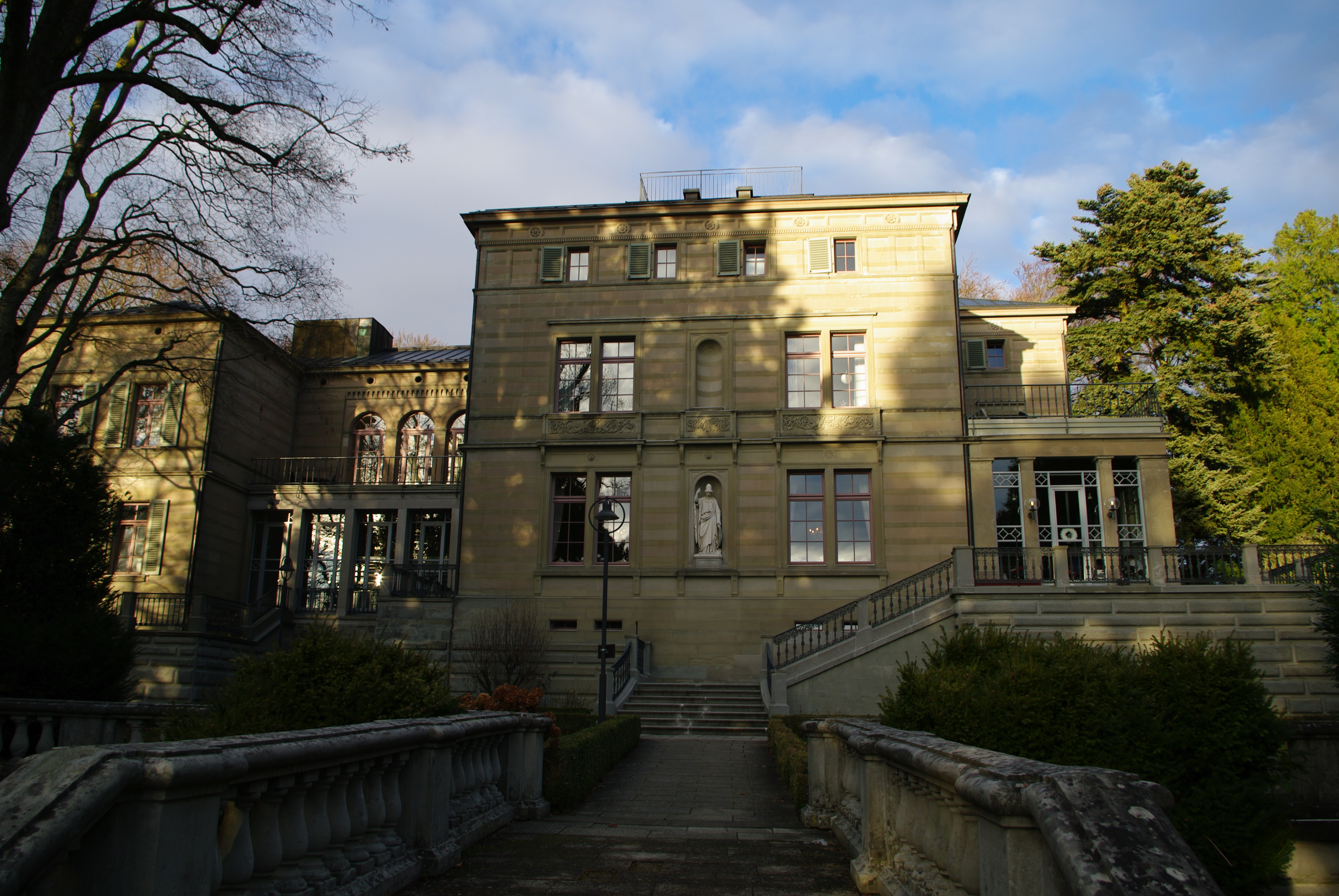 Villa Alwind in Bad Schachen, Ortsteil von Lindau (Bodensee)